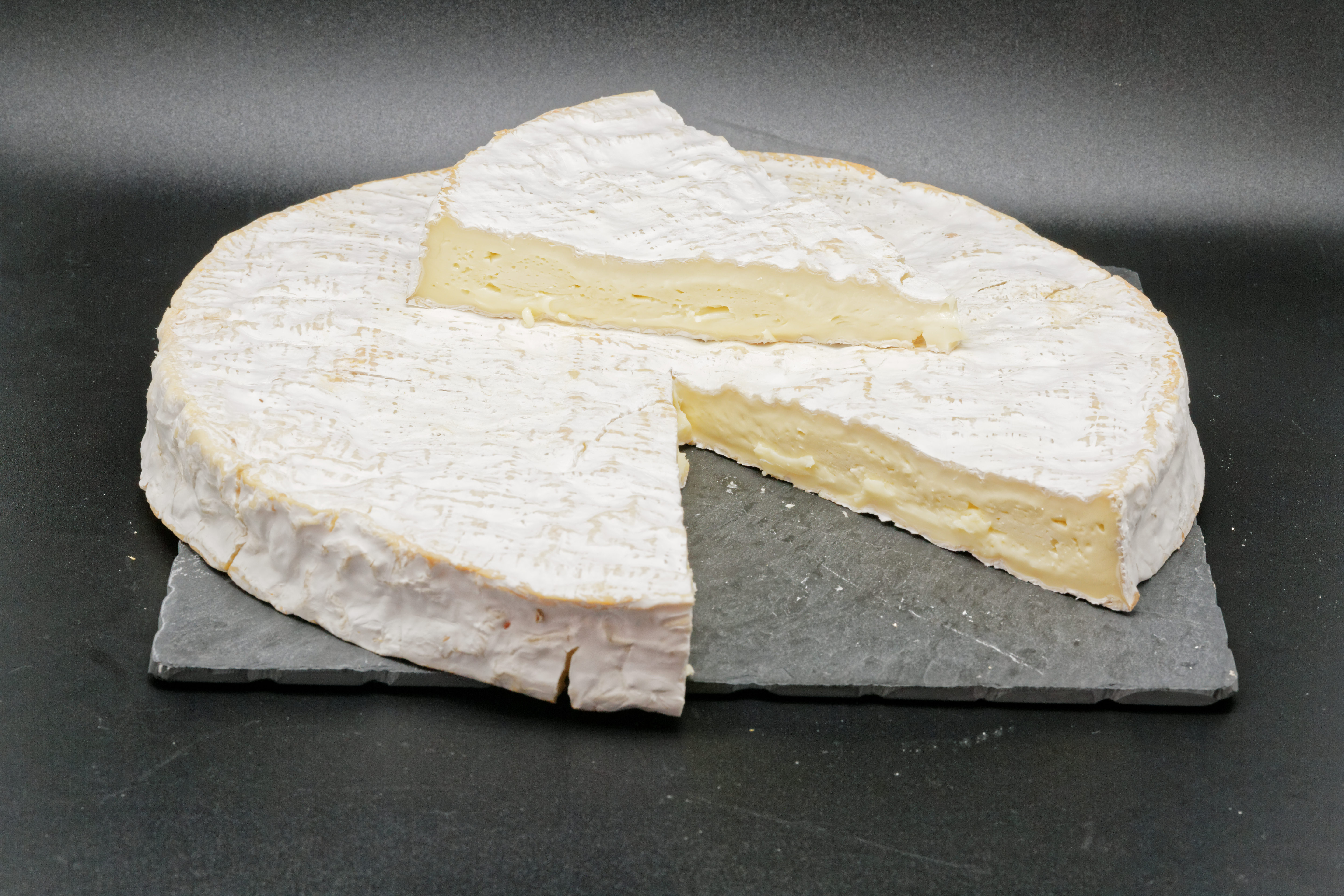 Le brie de Meaux est une appellation d'origine désignant un fromage au lait cru de la région de la Brie